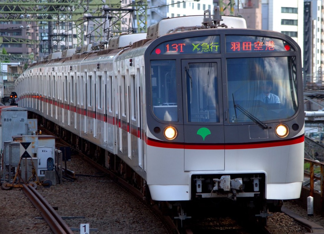 都営5300形5301編成によるエアポート急行羽田空港行き